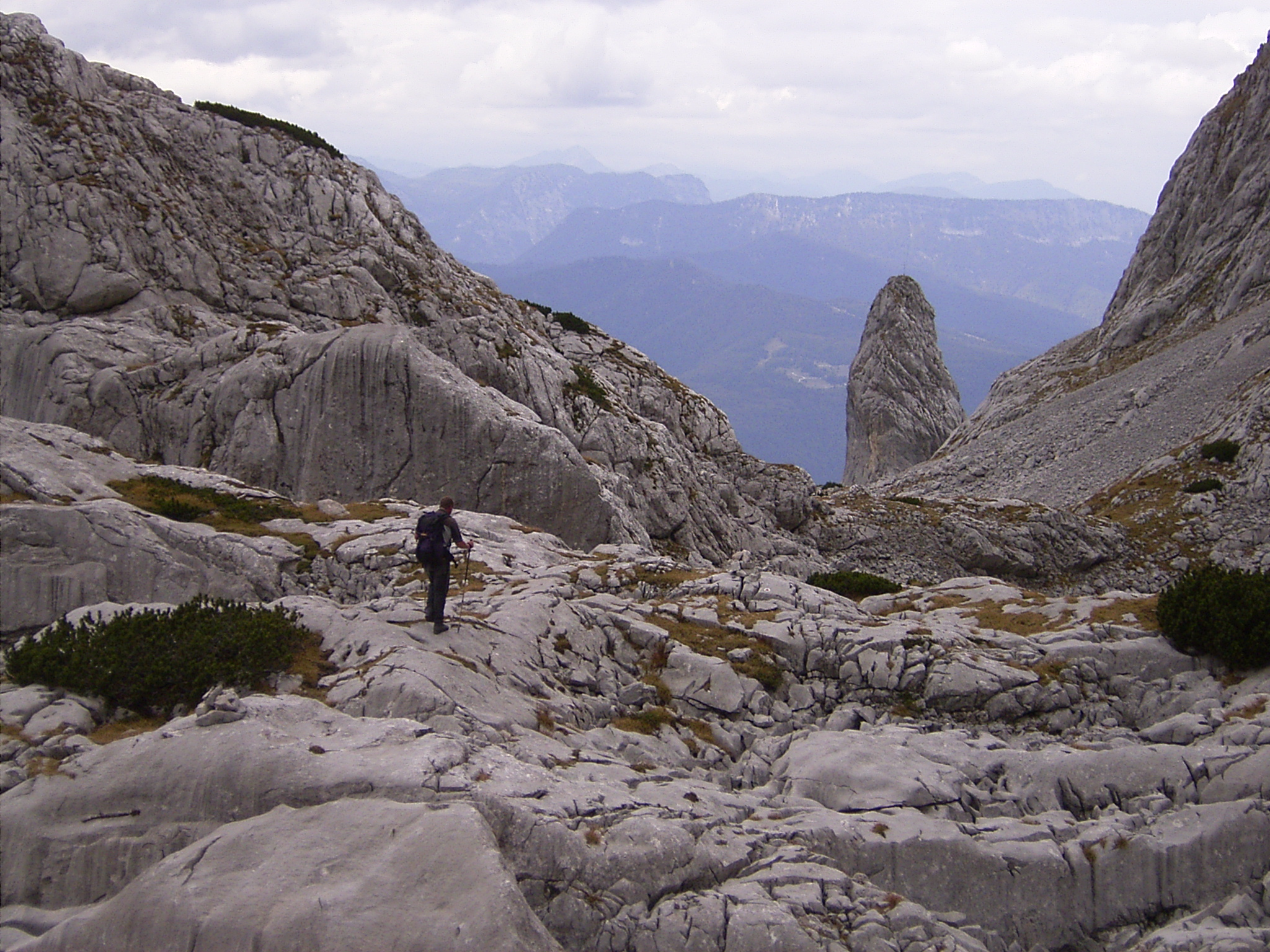 Unterwegs in den Umgängen des Gölls zwischen Hohem Göll und Hohem Brett, im Hintergrund das Pflughörndl